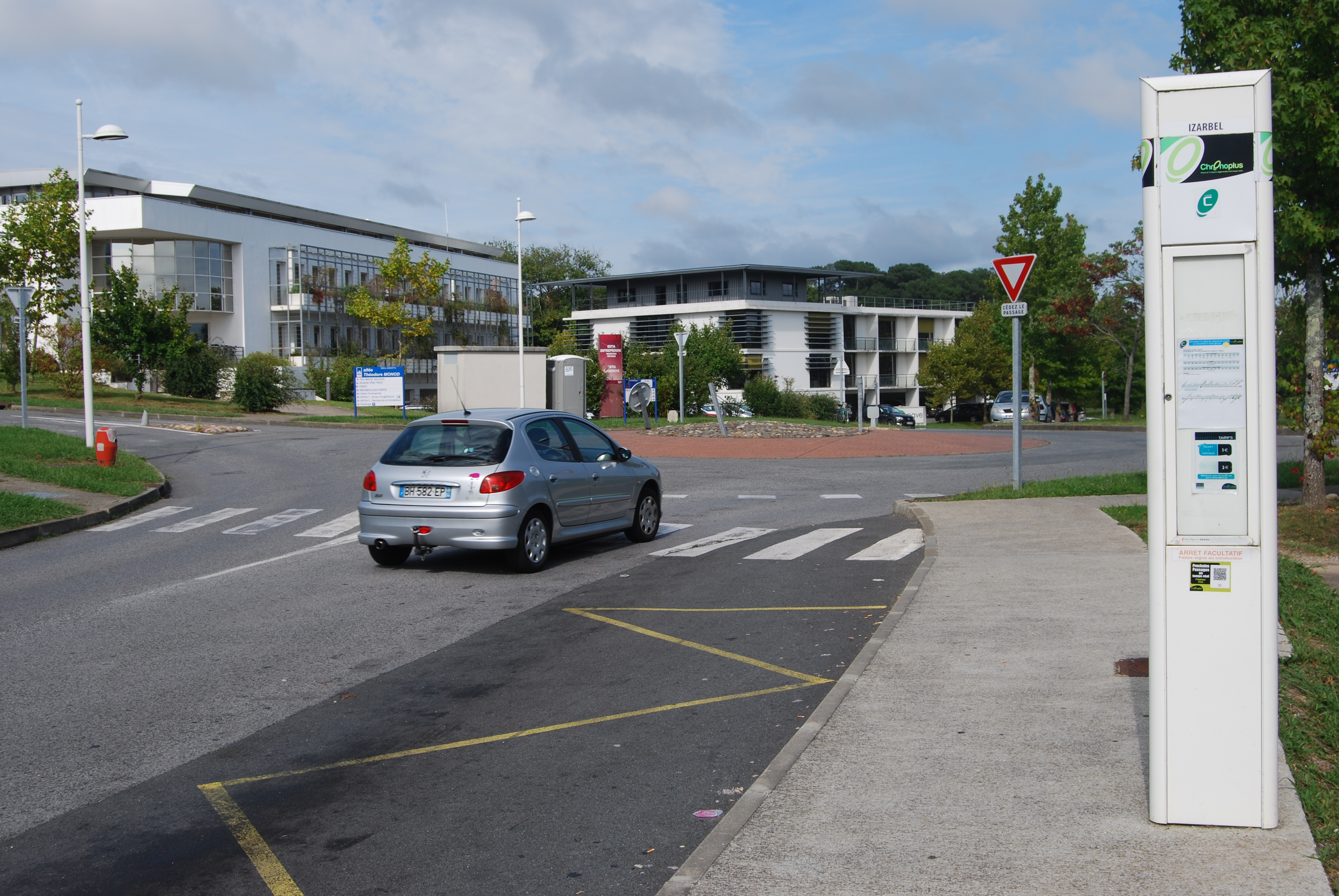 Arrêt de bus Bidart Izarbel, terminus de la ligne C du réseau Chronoplus, à l'été 2014.